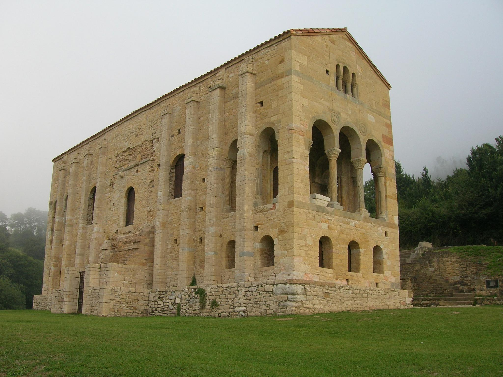 Iglesia de Santa María del Naranco